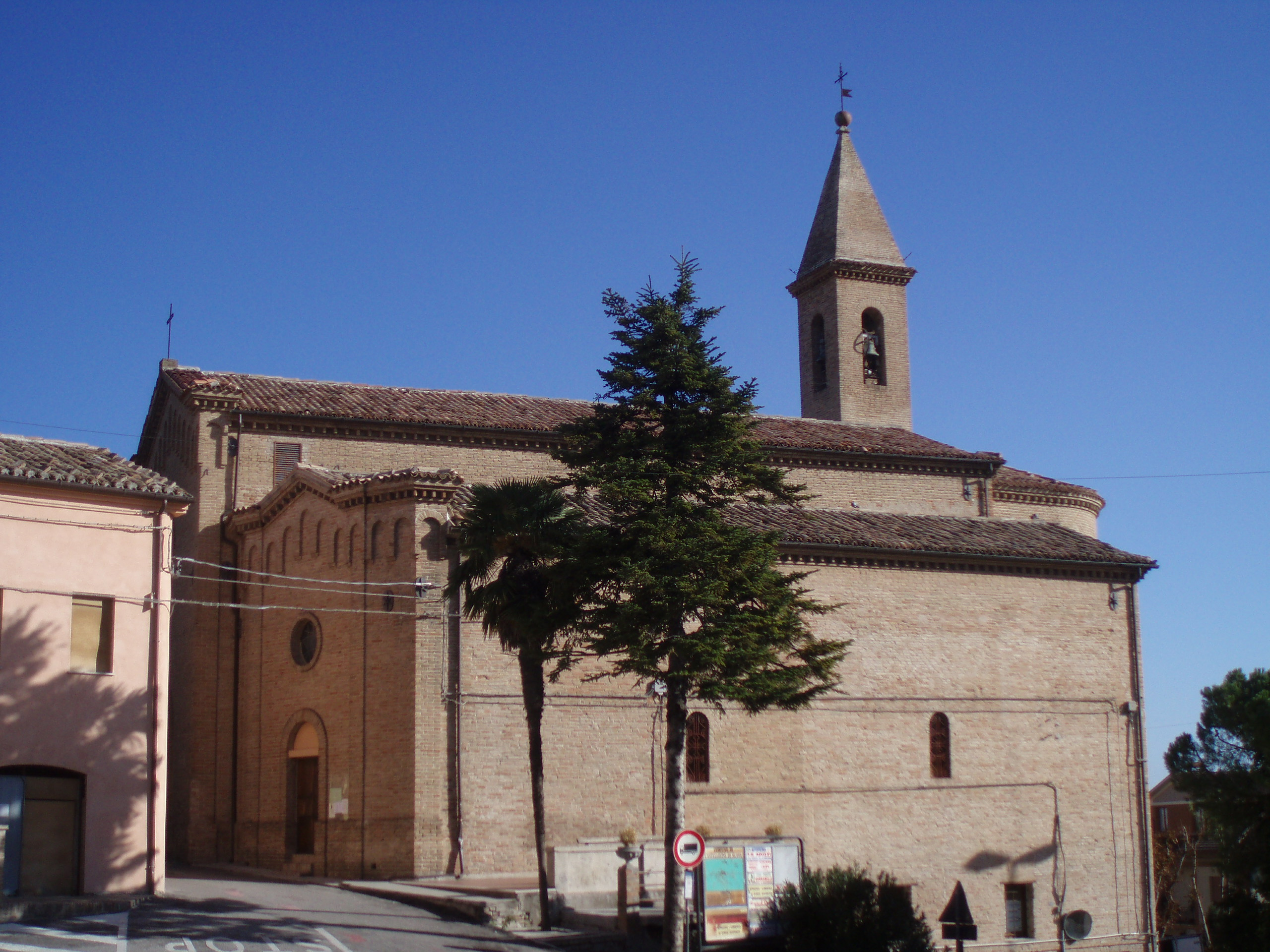 Chiesa parrocchiale SS Pietro e Paolo di Castelleone di Suasa, Italia - Vista dalla piazza.JPG